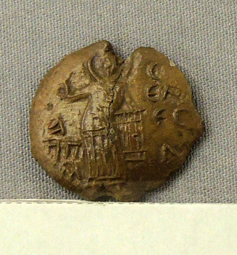 Печать актовая вислая князя московского Семена Ивановича (Гордого). Новгород, 1341-1353. Свинец, оттиск. Съемка: выставка "Интермузей" (Москва). Экспонат: коллекция актовых вислых печатей 11 - начала 16 веков в составе 150 булл Древней Руси, Новгорода, Пскова, Рима и Византийской империи. НГОМЗ. Поступила в музей в 2013 г. Около трети из этих 150 экспонатов ранее не были известны исследователям, другие были зарегистрированы в 1-2 экз.